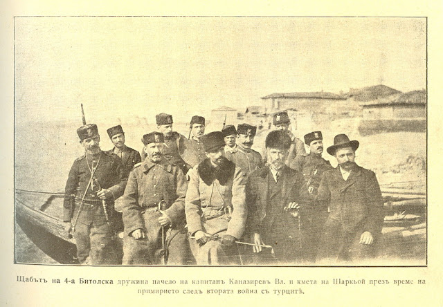 Владимир Каназирев и щабът на 12 битолска дружина на МОО с кмета на Шаркьой